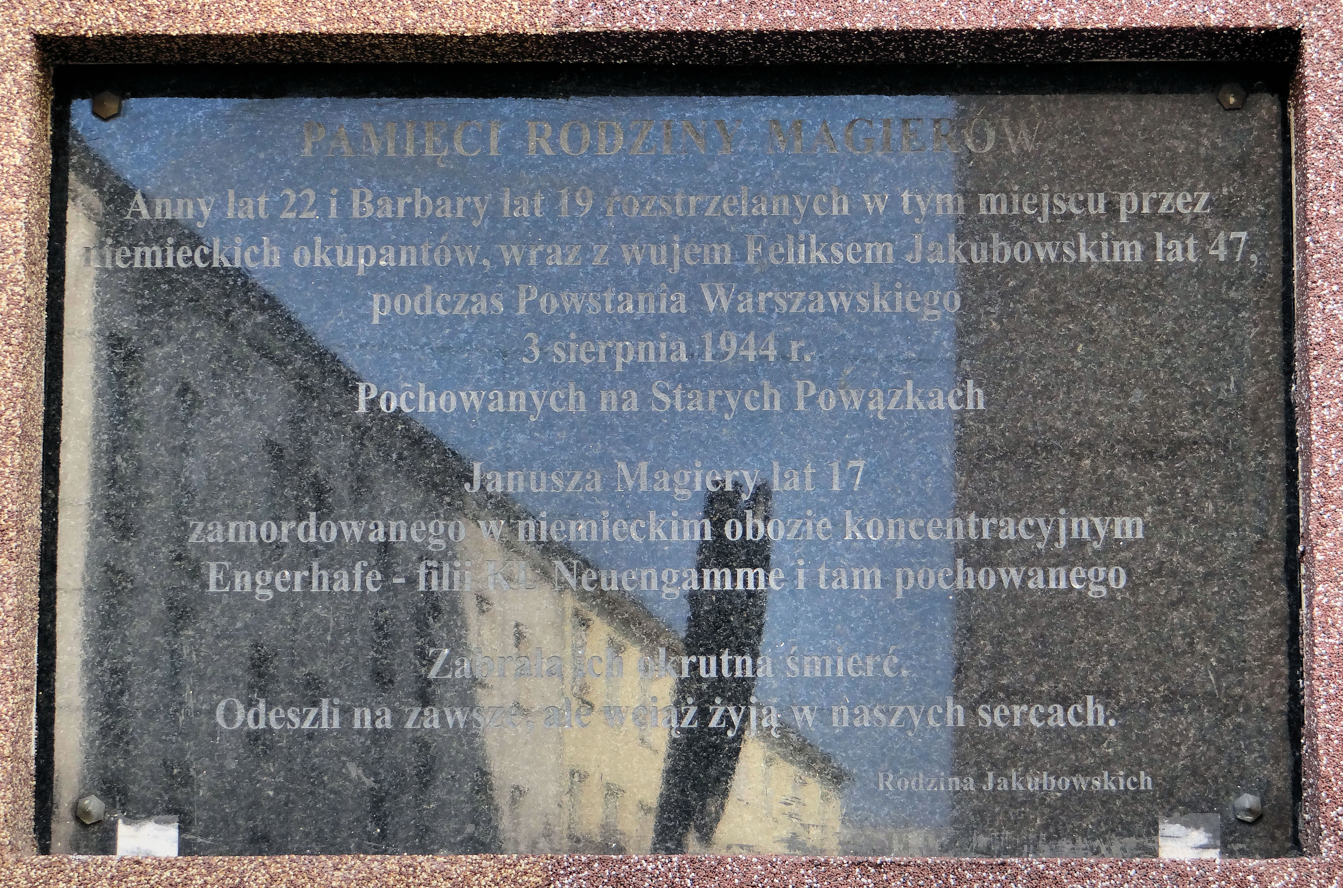 Tablica informuje, że w dniu 3 sierpnia 1944 roku w masowej rzezi mieszkańców kamienicy przy ulicy Puławskiej 71 niemieccy oprawcy wymordowali członków rodziny Magirów